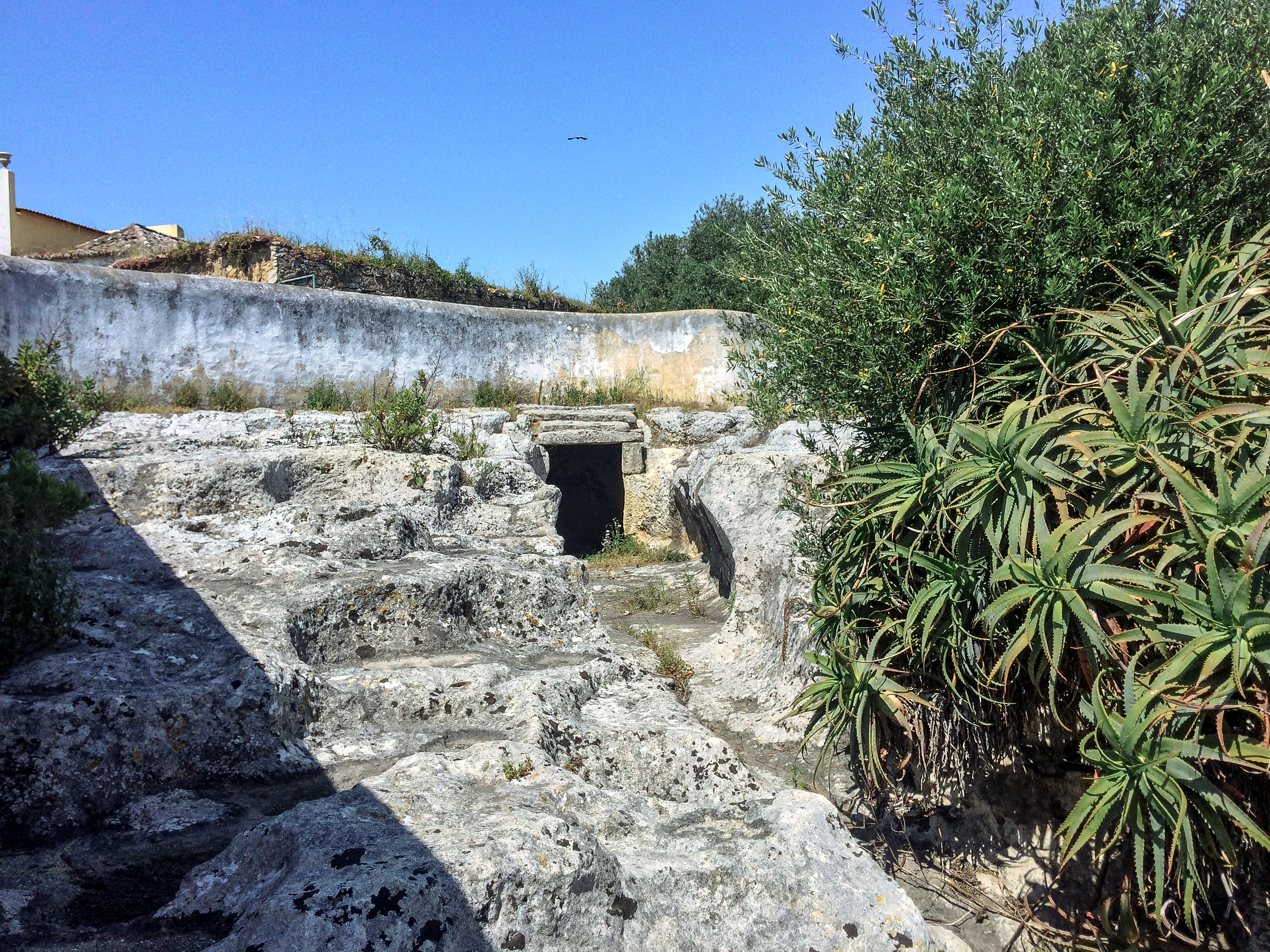 Entrada das grutas de Alapraia.